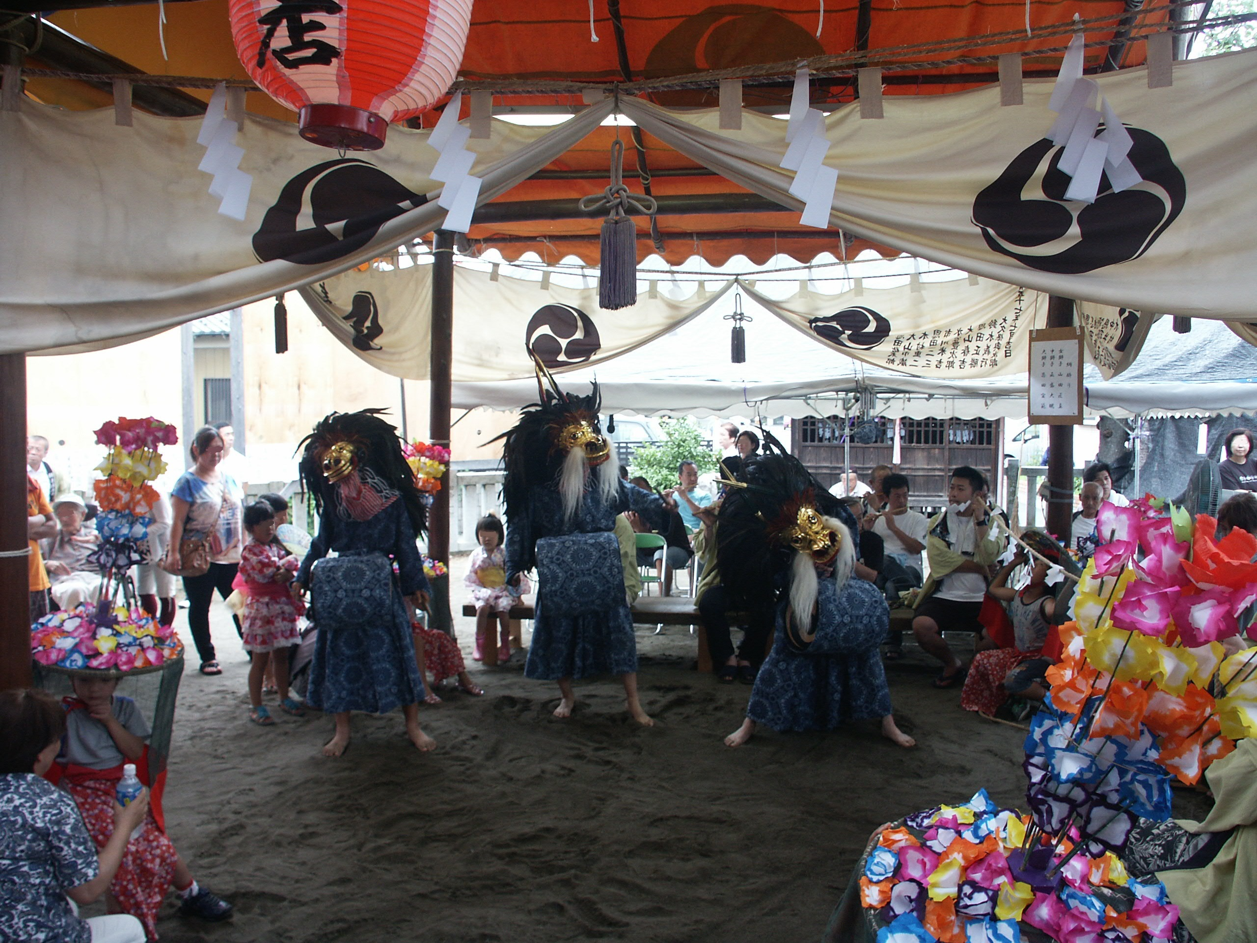 埼玉県八潮市二丁目の氷川神社で行われている獅子舞（三匹獅子舞）